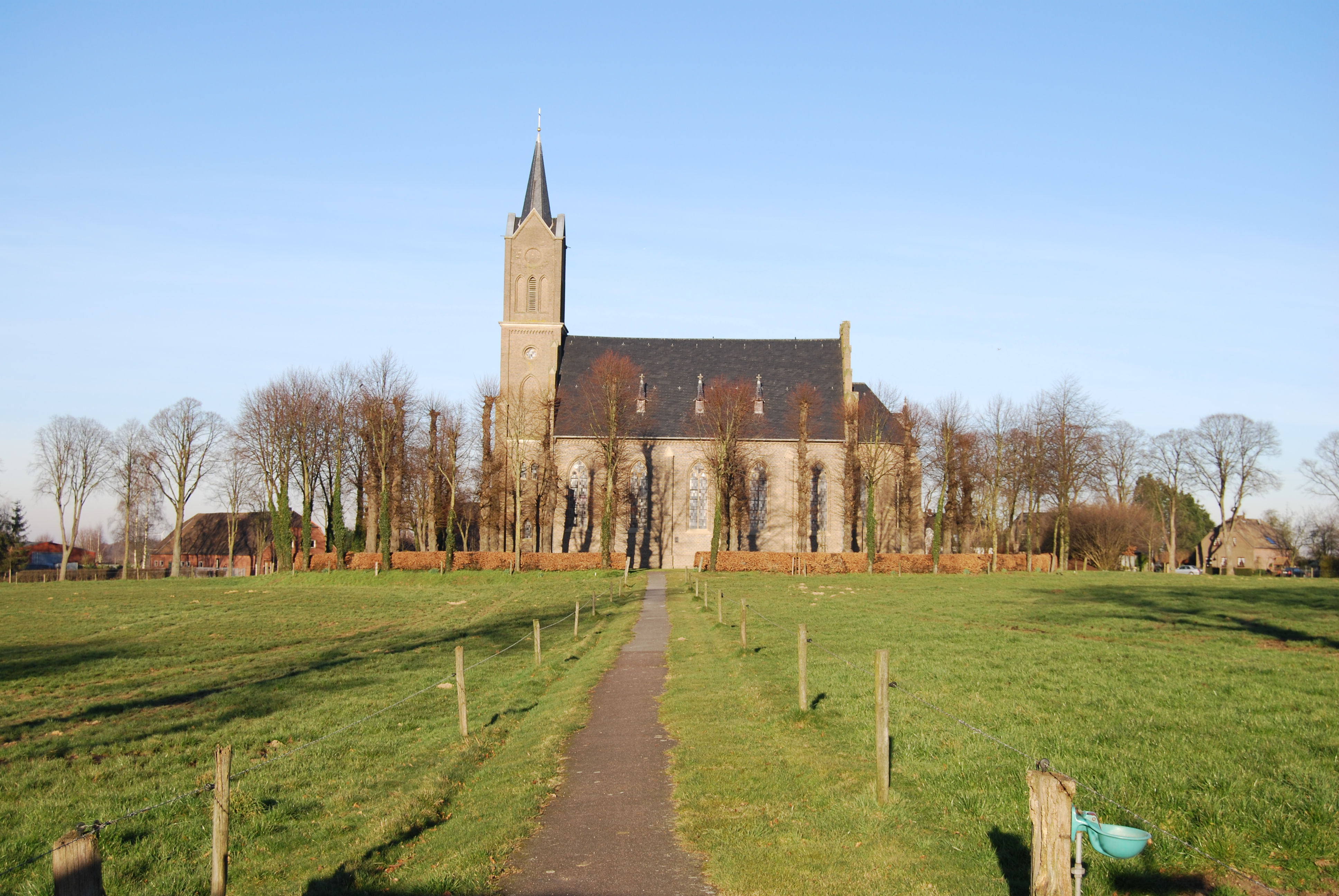 Louisenplatz mit Kirche in Bedburg-Hau, Kreis Kleve, NRW. Zeigt den zentralen Punkt der Kolonie.